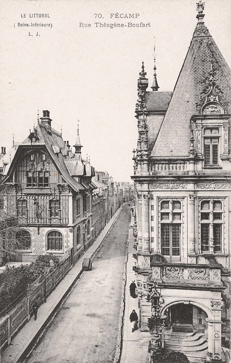 Carte postale